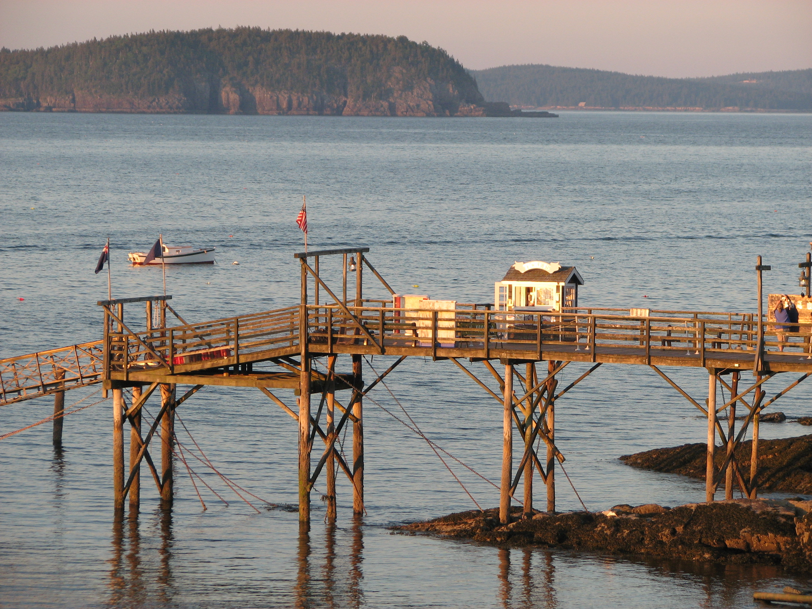 Jetée en bois dans le port de Bar Harbor (Maine), en fin de journée.